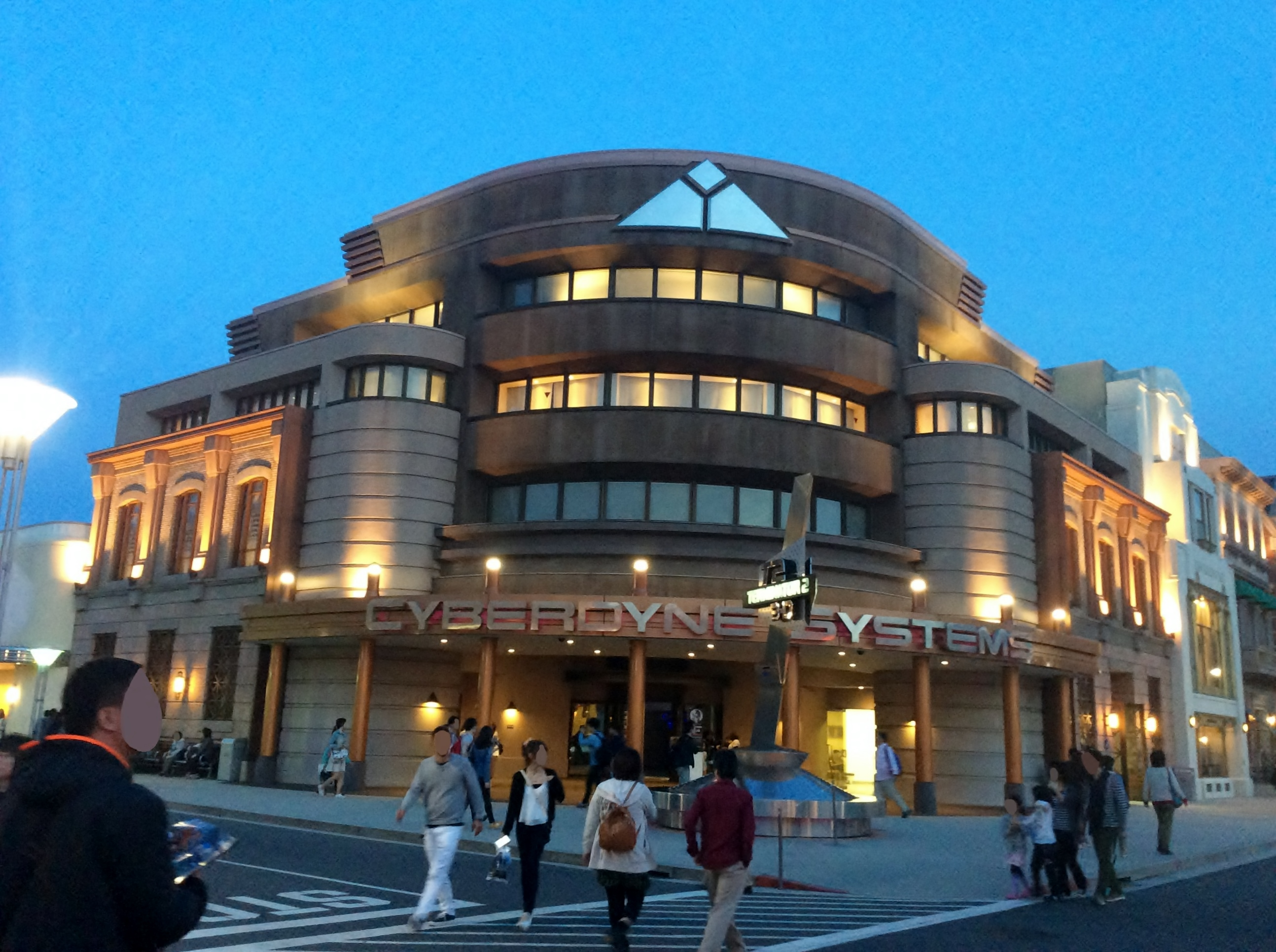 USJ構内にあるサイバーダイン社のビルを撮影。